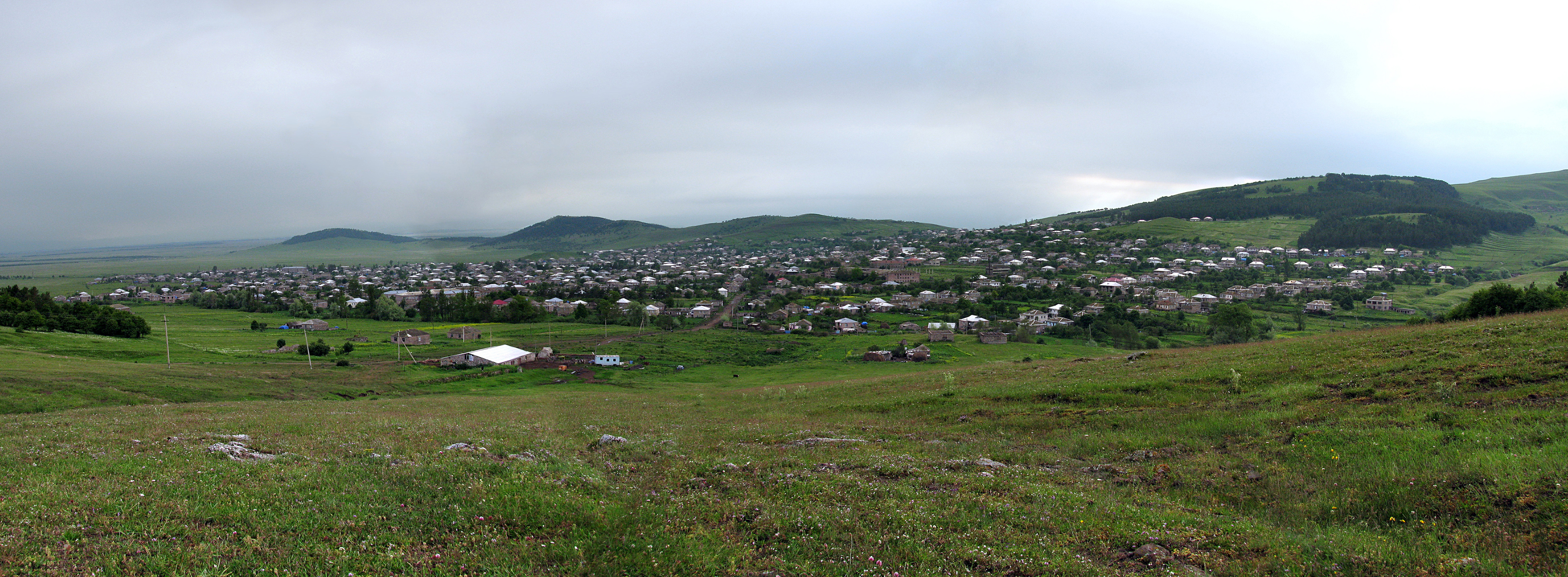 Մեծավանի համայնապատկերը արևելյան կողմից